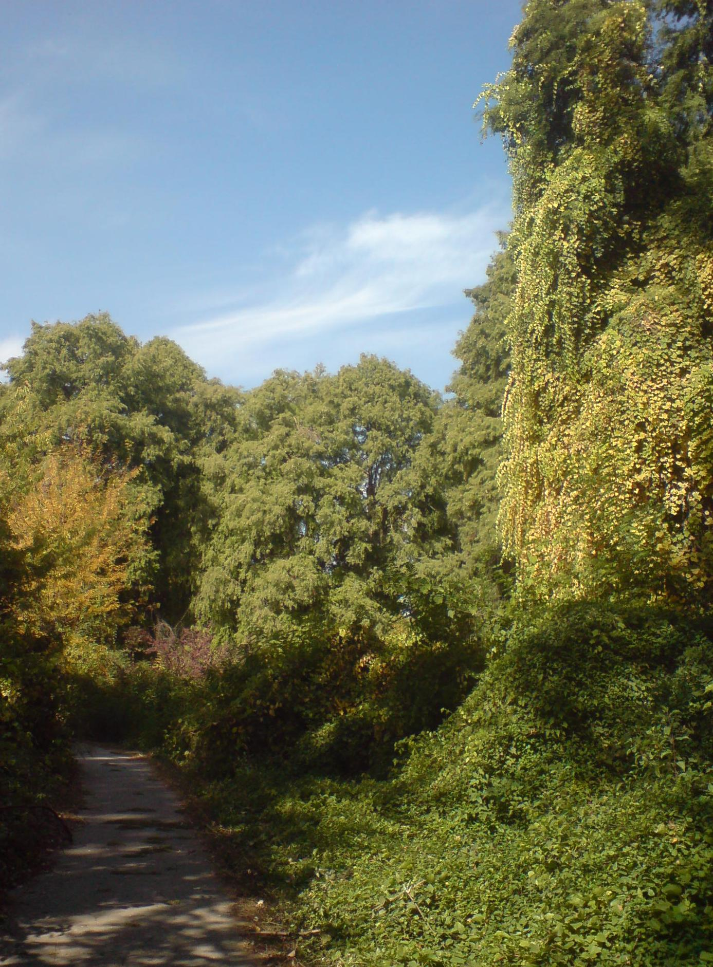 Ботанический сад Ташкента, североамериканская коллекция. Дикий виноград